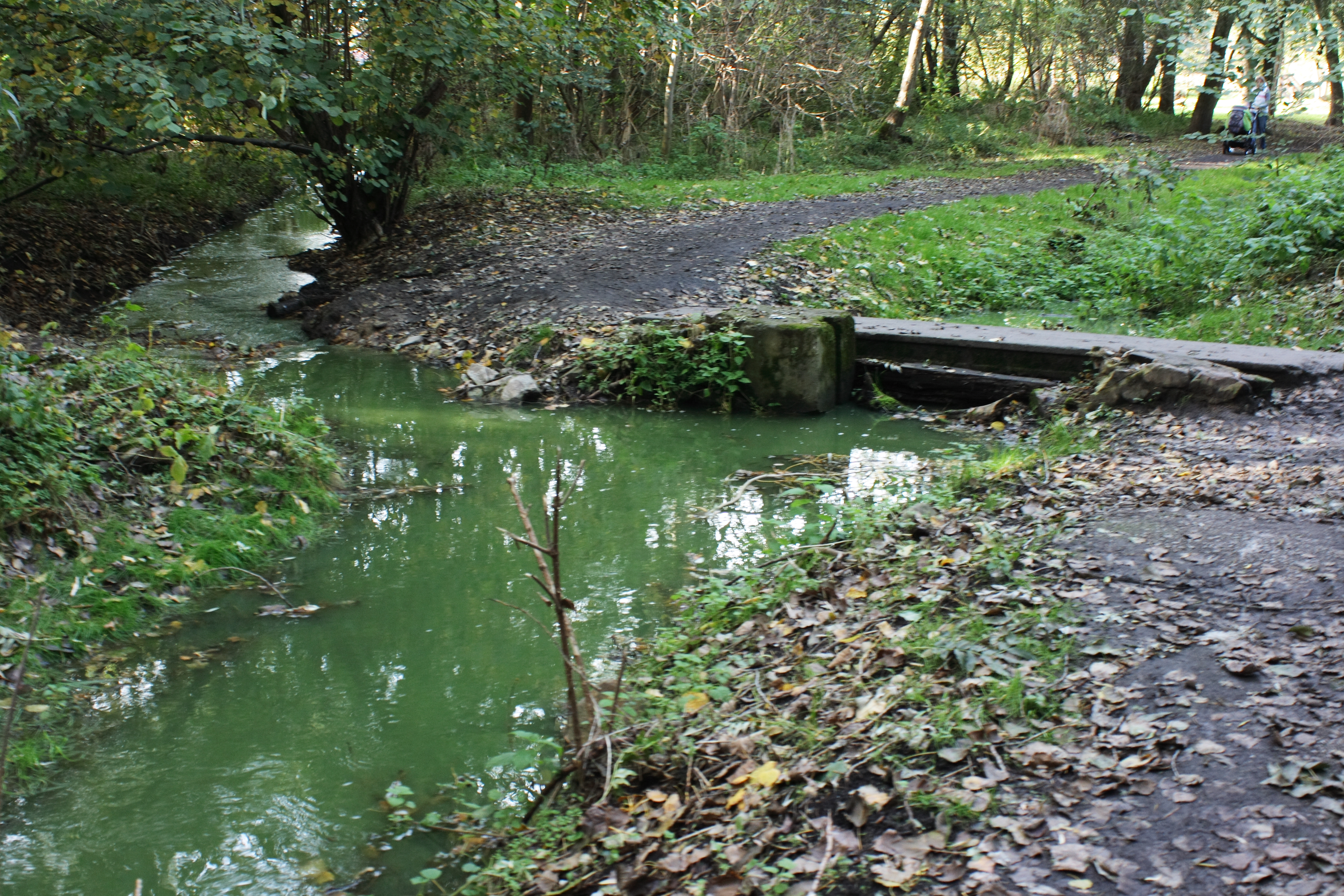 Mechanismus, který rozděloval vodu vytékající z rybníka Kala na přítok do Litovického rybníka a potok, který tekl strouhou za Litovickým rybníkem